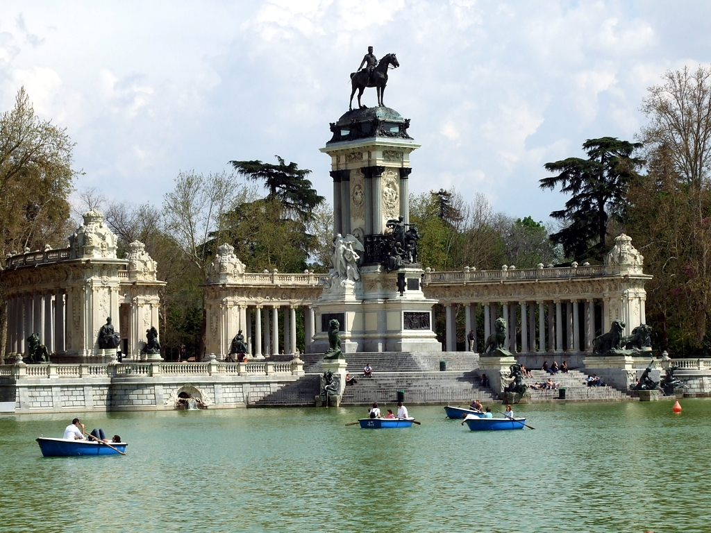 Estanque del Retiro, en los Jardines del Retiro de Madrid.